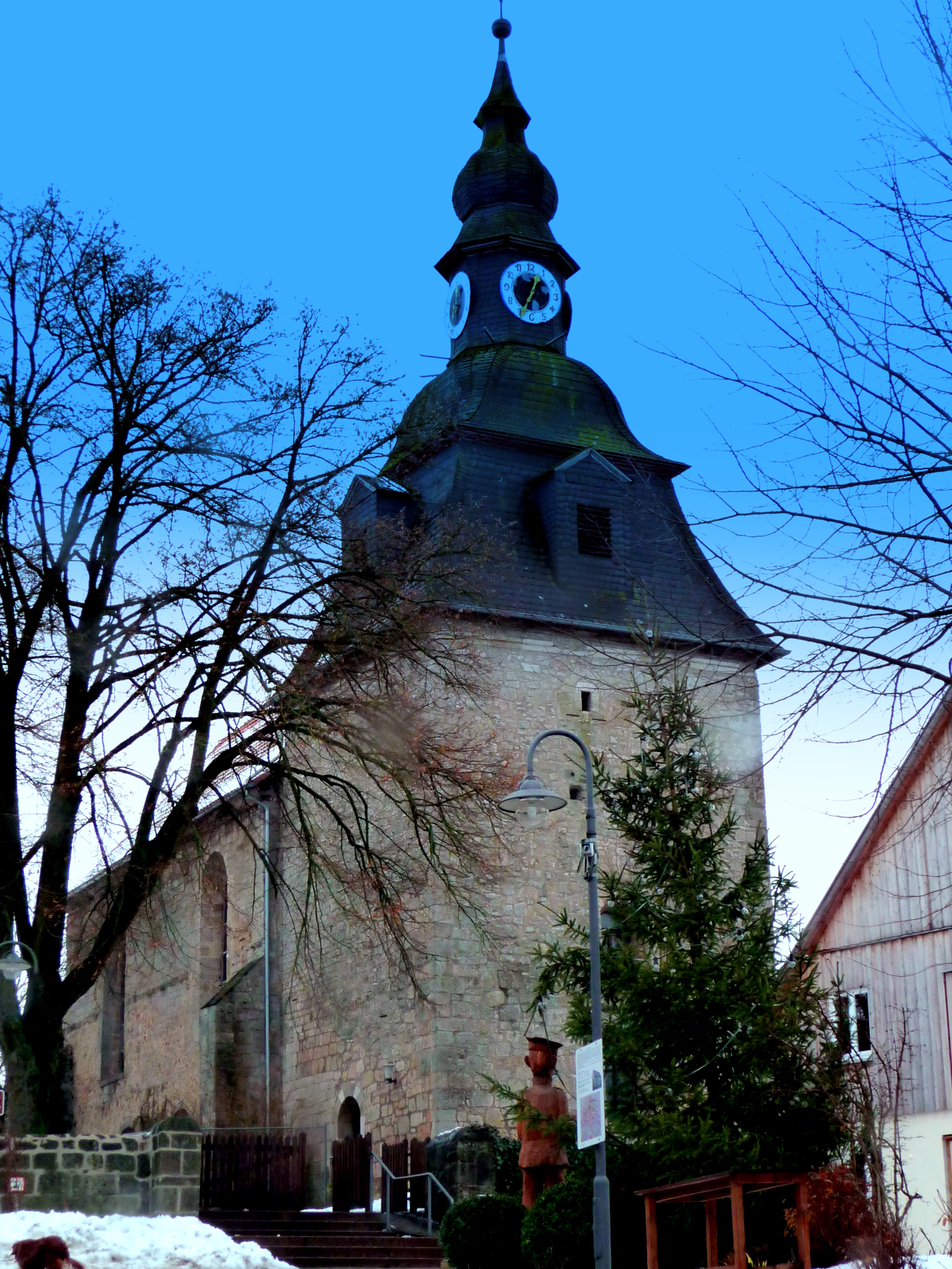 Goddelsheim - Ev. Kirche - 2009+-25-12